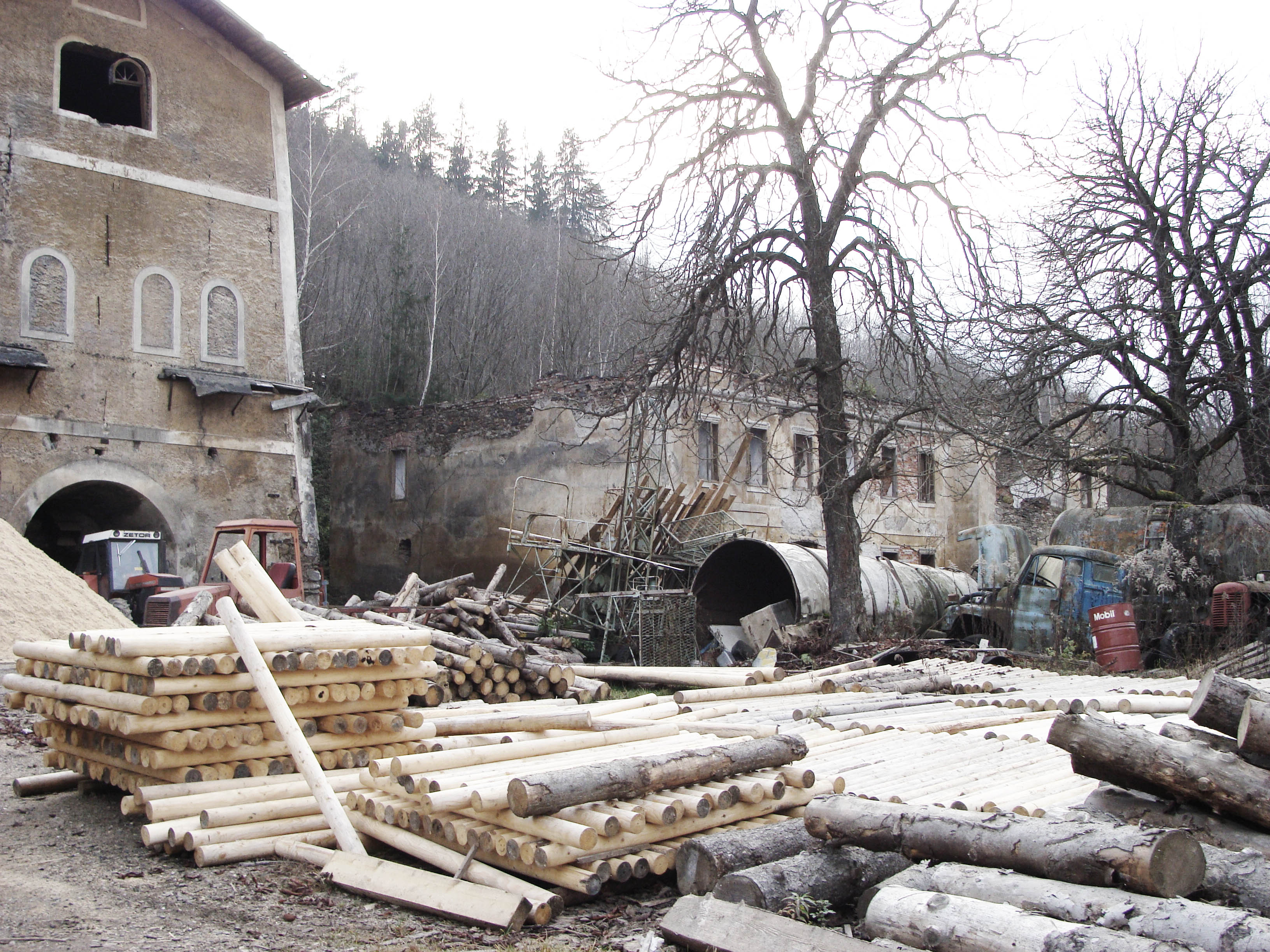 Objekt vysokej pece ja pamiatkovo chránenou stavbou vo vlastníctve Slovenského technického múzea v Košiciach. Napriek tomu chátra spolu s ostatnými objektmi. Po zastavení prevádzky v roku 1907 bola železiareň prebudovaná na pražiarenský závod prípravy rúd.